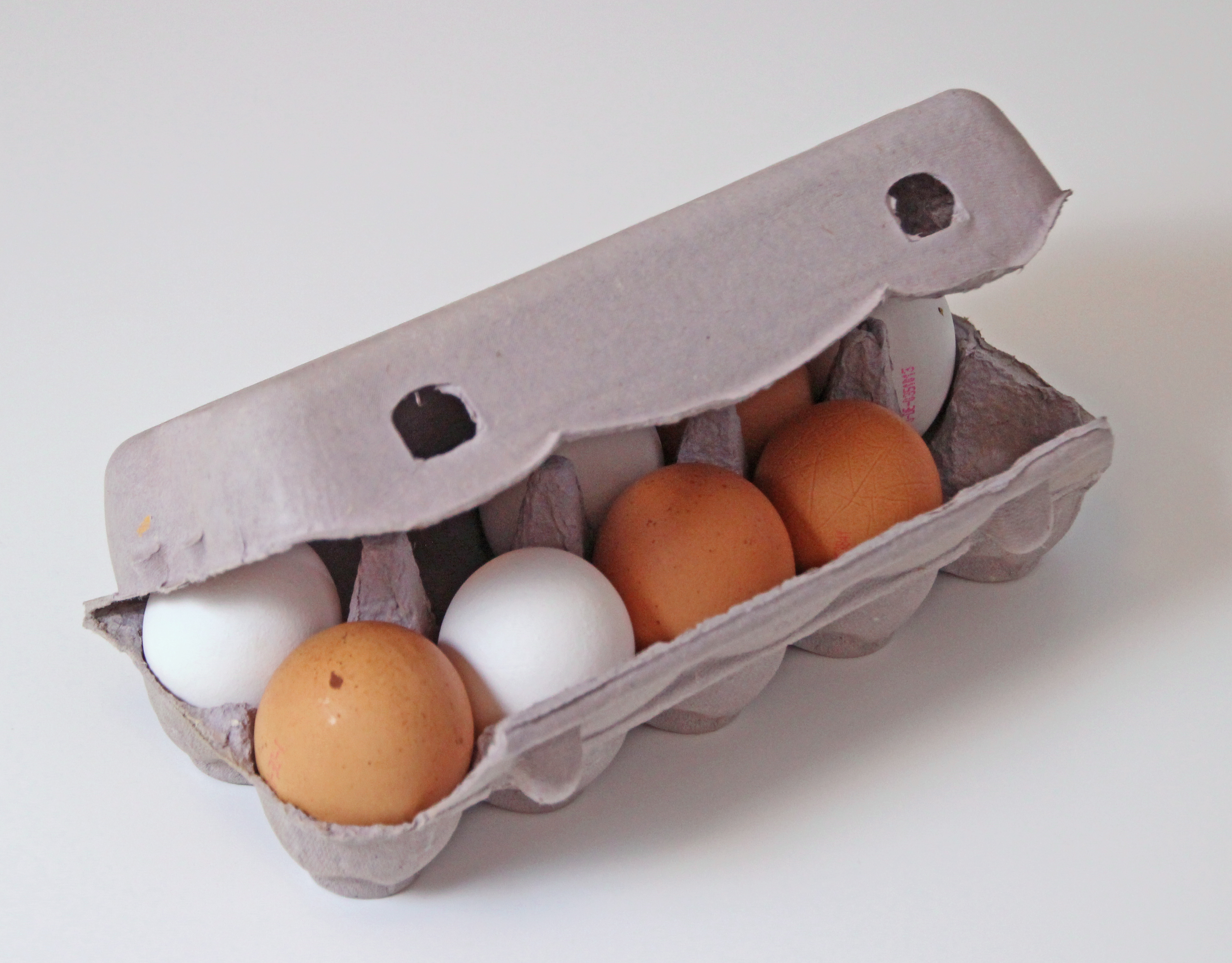 Bildinhalt: Unbedruckter halb geöffneter Eierkarton mit 8 Eiern vor grauem Hintergrund Aufnahmeort: Frankfurt am Main, Deutschland